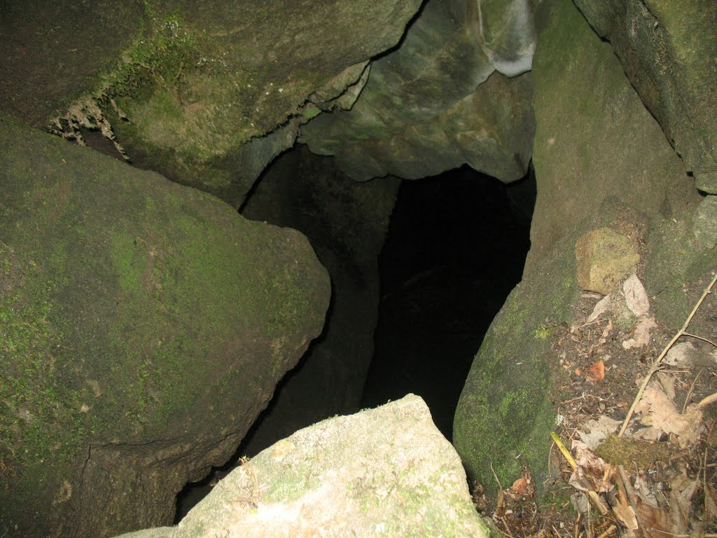 Les grottes sont rares dans les Voirons, pourtant, il y en a une, ou plutôt un gouffre qui à la particularité de posséder deux entrées, plus accessible vers le nord car très étroite et plus profonde au sud. Cette petite caverne mesure 40 mètres de long. Pour spéléologues professionnels ou expérimentés ! Ce gouffre qui est unique dans les Voirons!